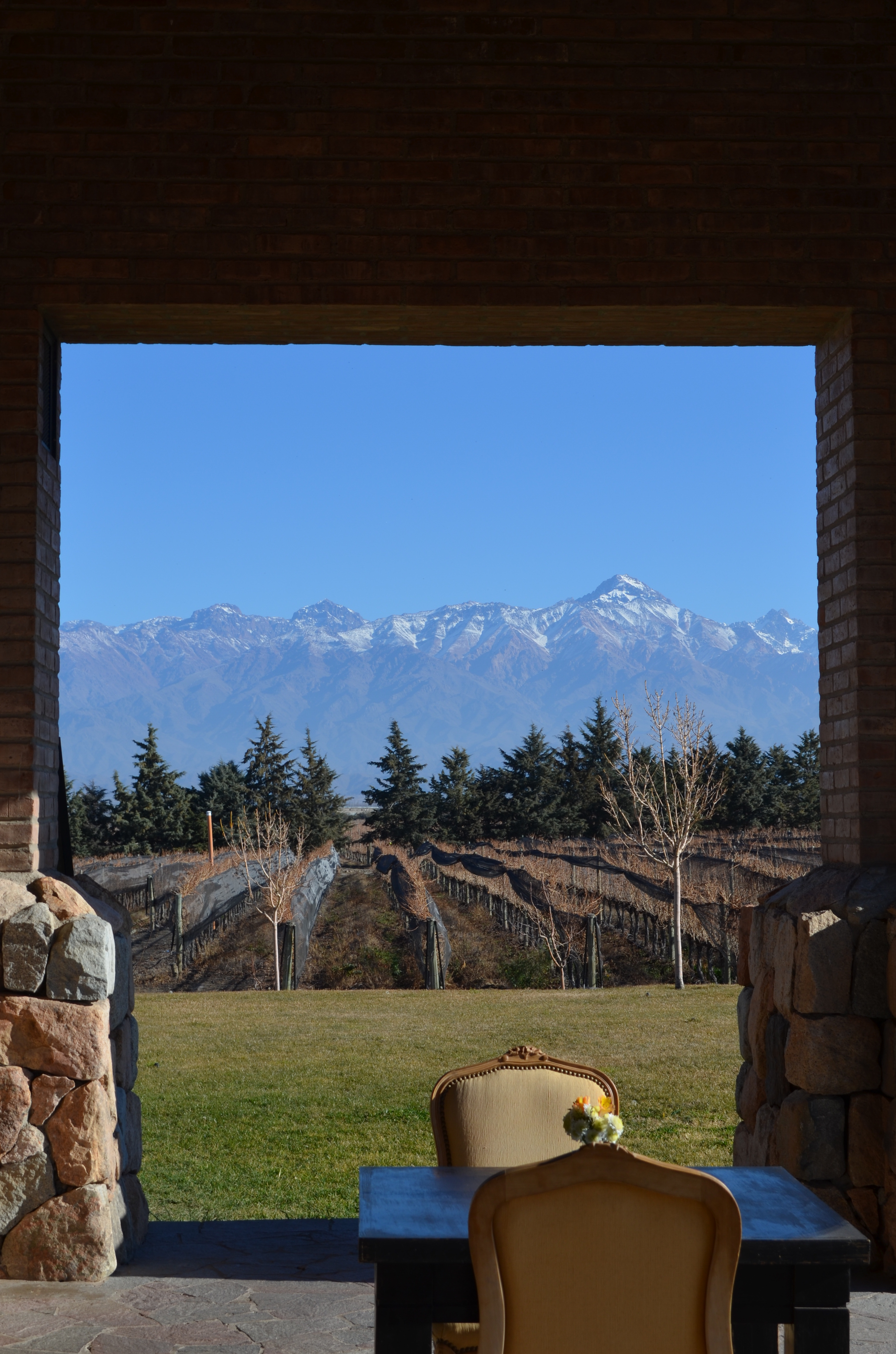 Trinidad Fernández Wallace